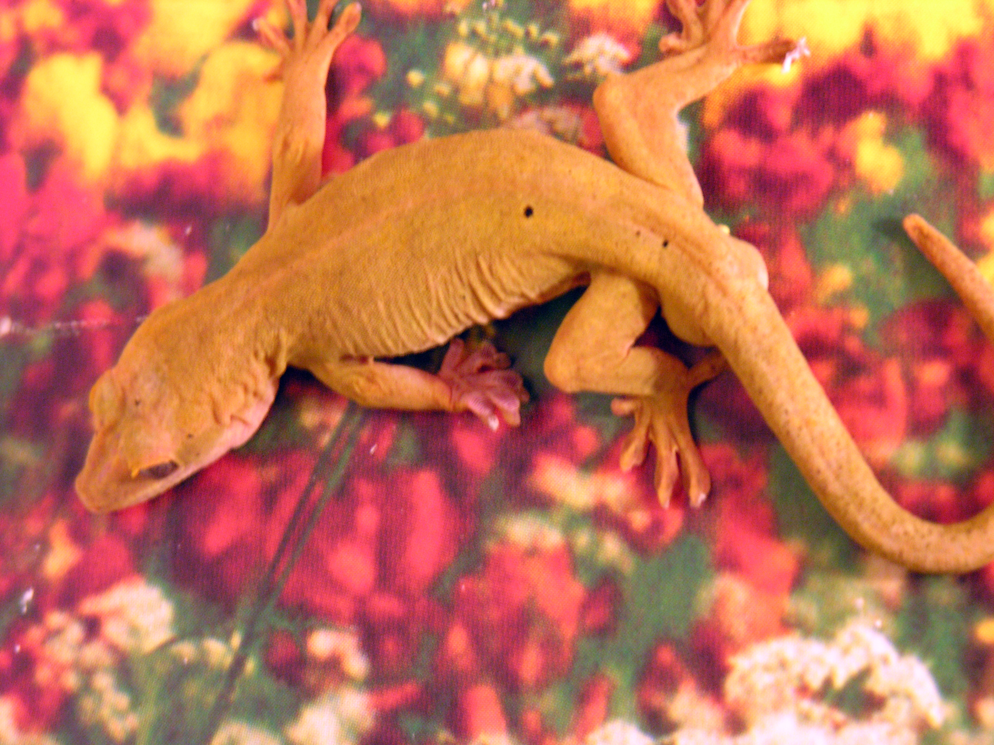 Gekko ulikovskii